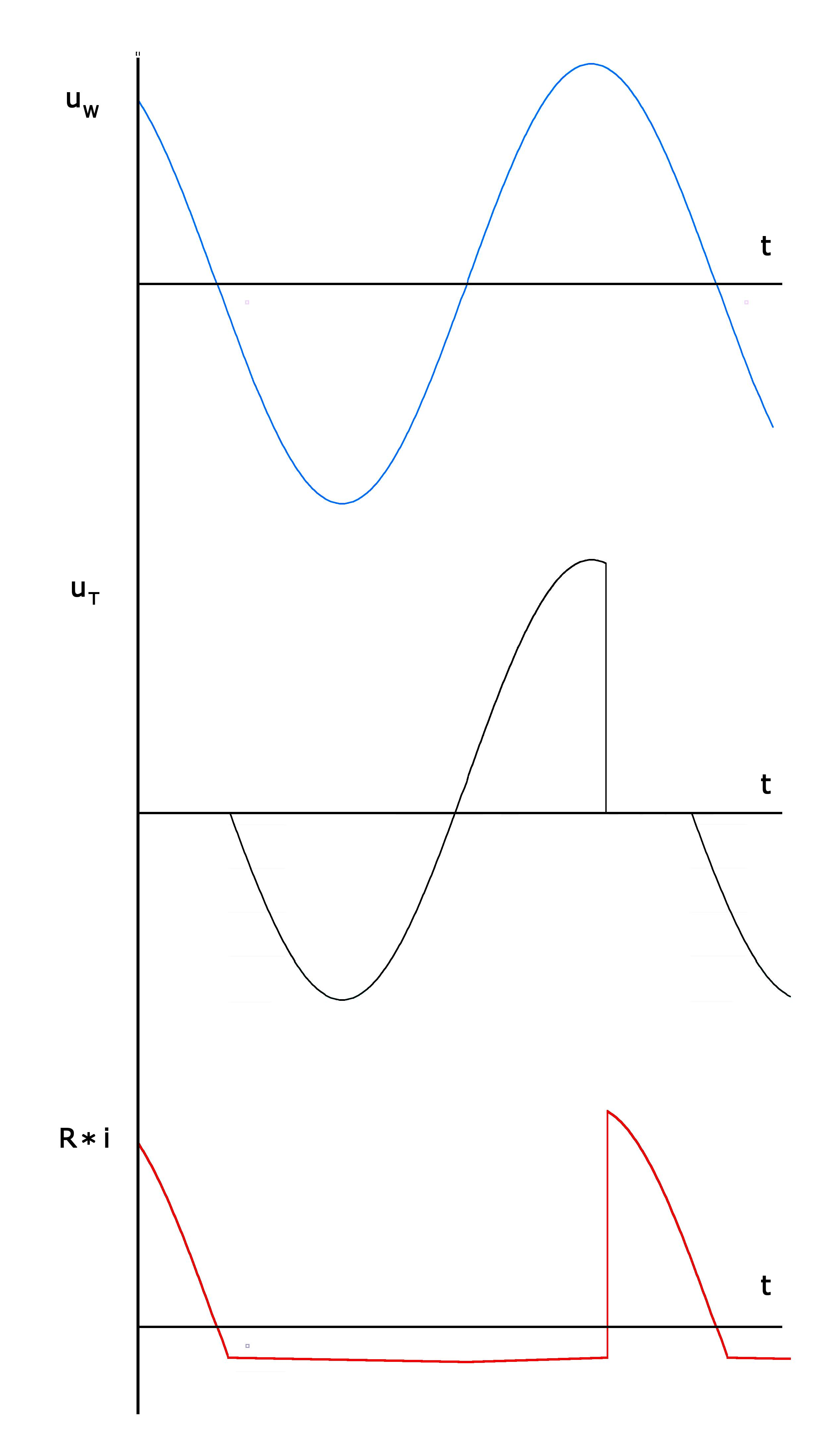 Zeitliche Verläufe von Spannungen von Transduktorschaltung